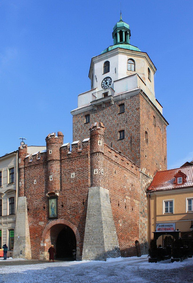 Brama Krakowska w Lublinie.